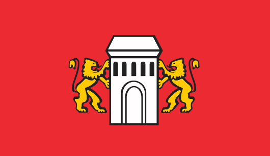 Flaga Niepołomic (miasto w Polsce, pod Krakowem).